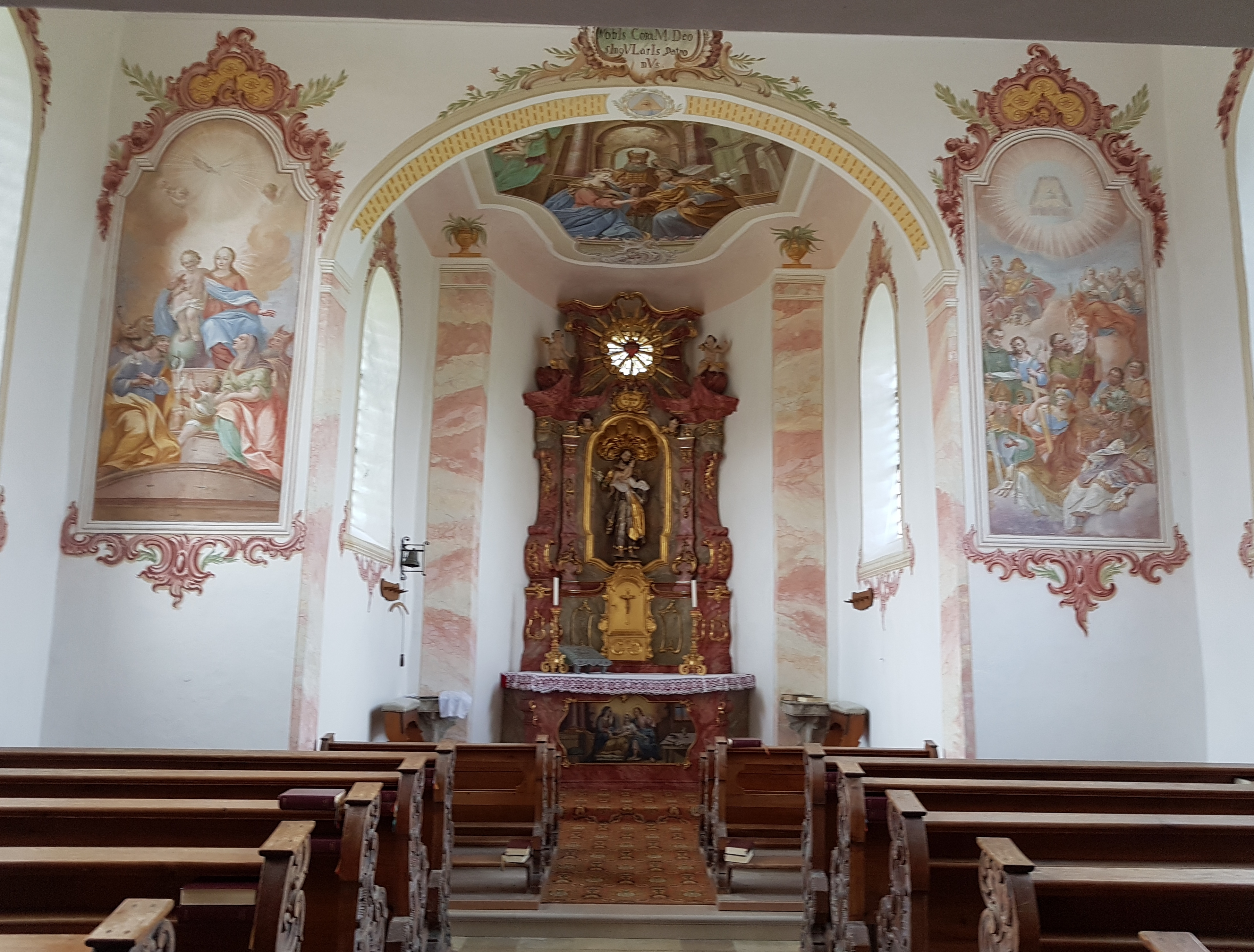 Thannenberg (Bruggen), Kapelle St. Josef